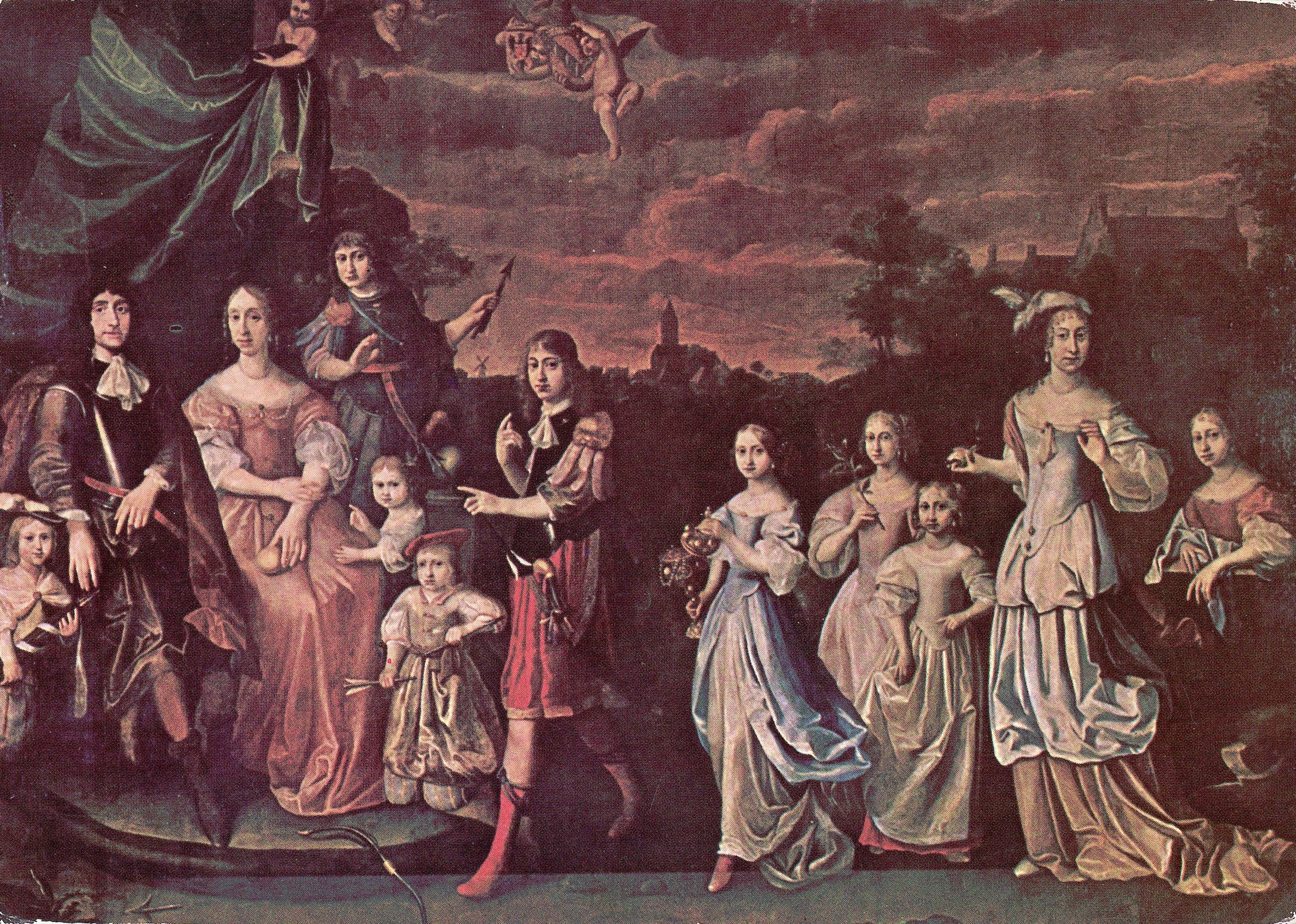 Familieportret van Allard Tjarda van Starkenborgh met zijn vrouw Gratia Susanna Clant en hun tien (levende) kinderen: Middenin op de voorgrond oudste zoon Edzart Jacob. Rechts eerstgeboren kind en oudste dochter Frederica. Verspreid ertussen de andere kinderen Lambert, Bouwina, Anna, Elisabeth, Barthold, Josina, Albert en Hiddina Anna. In de lucht twee engeltjes met de wapens van de families Van Starkenborgh en Clant die gestorven kinderen symboliseren. Rechtsboven de borg Verhildersum. In het midden het dorp Leens met de toren van de Petruskerk.